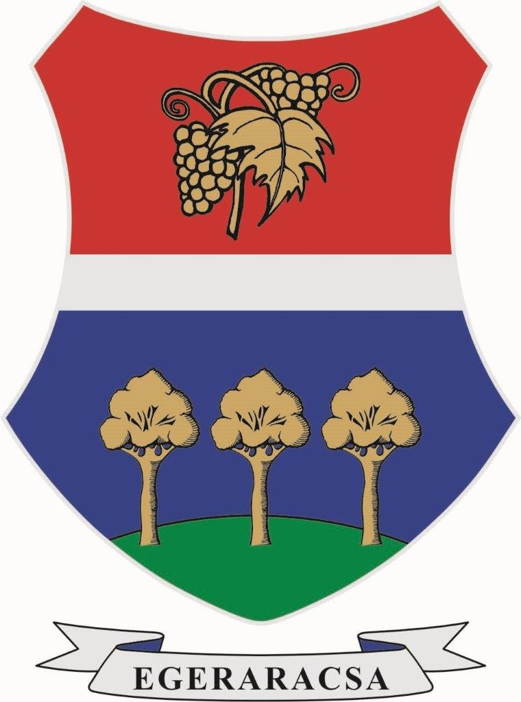 Település címere